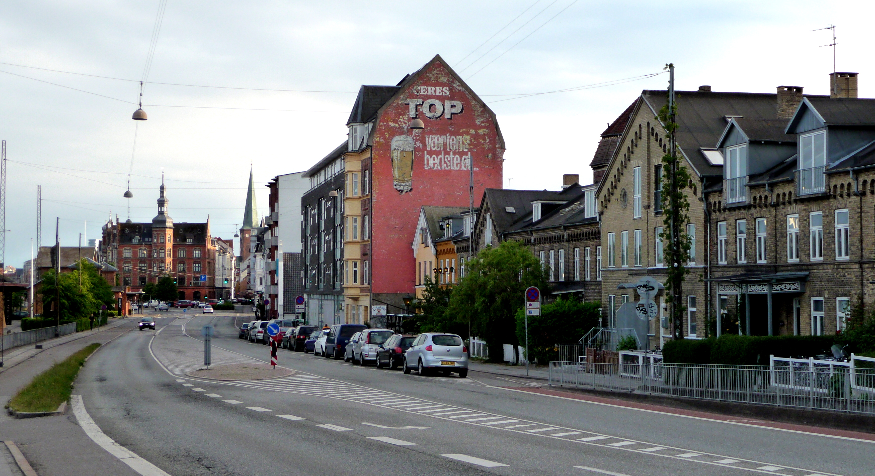 Skovvejen, Aarhus, Danmark